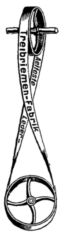 Leder-Treibriemen, schematisch auf den antriebsrädern anno 1888